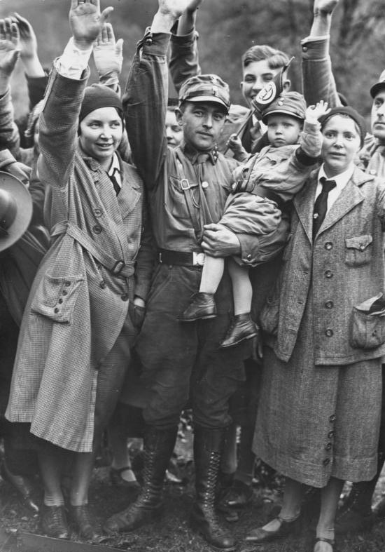 Der große Aufmarsch der nationalen Opposition unter Führung von Hugenberg und Hitler in Bad Harzburg ! Nationalsozialistische Enthusiasten mit dem jüngsten Parteimitglied beim Aufmarsch der Verbände in Bad Harzburg. Oktober 1931